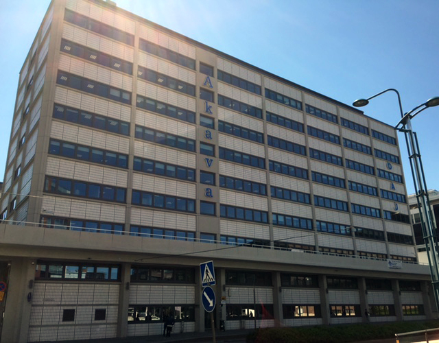 Kuva Akavatalosta Rautatieläisenkadun puolelta, Itä-Pasila, Helsinki